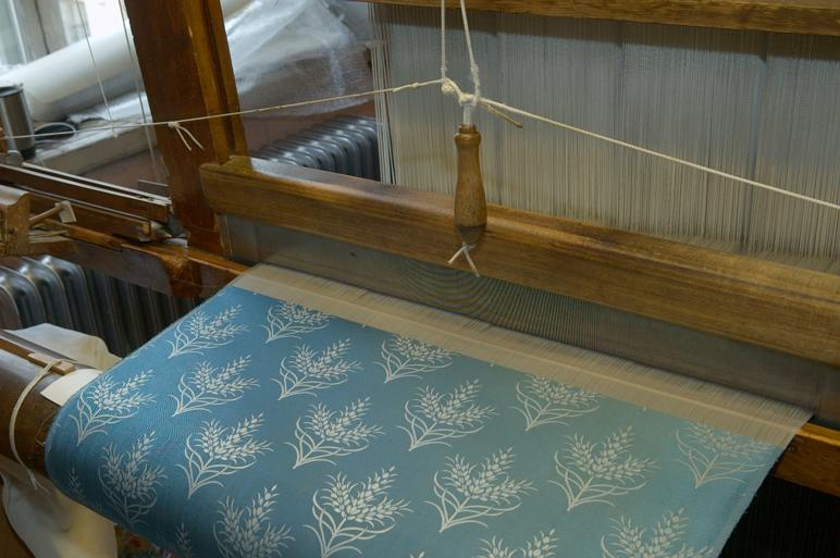 Möbeltyg "Ax" i sidendamast. Motiv: Almgrens sidenväveri Kategori: Väveri, Museum Möbeltyg "Ax" i sidendamast.